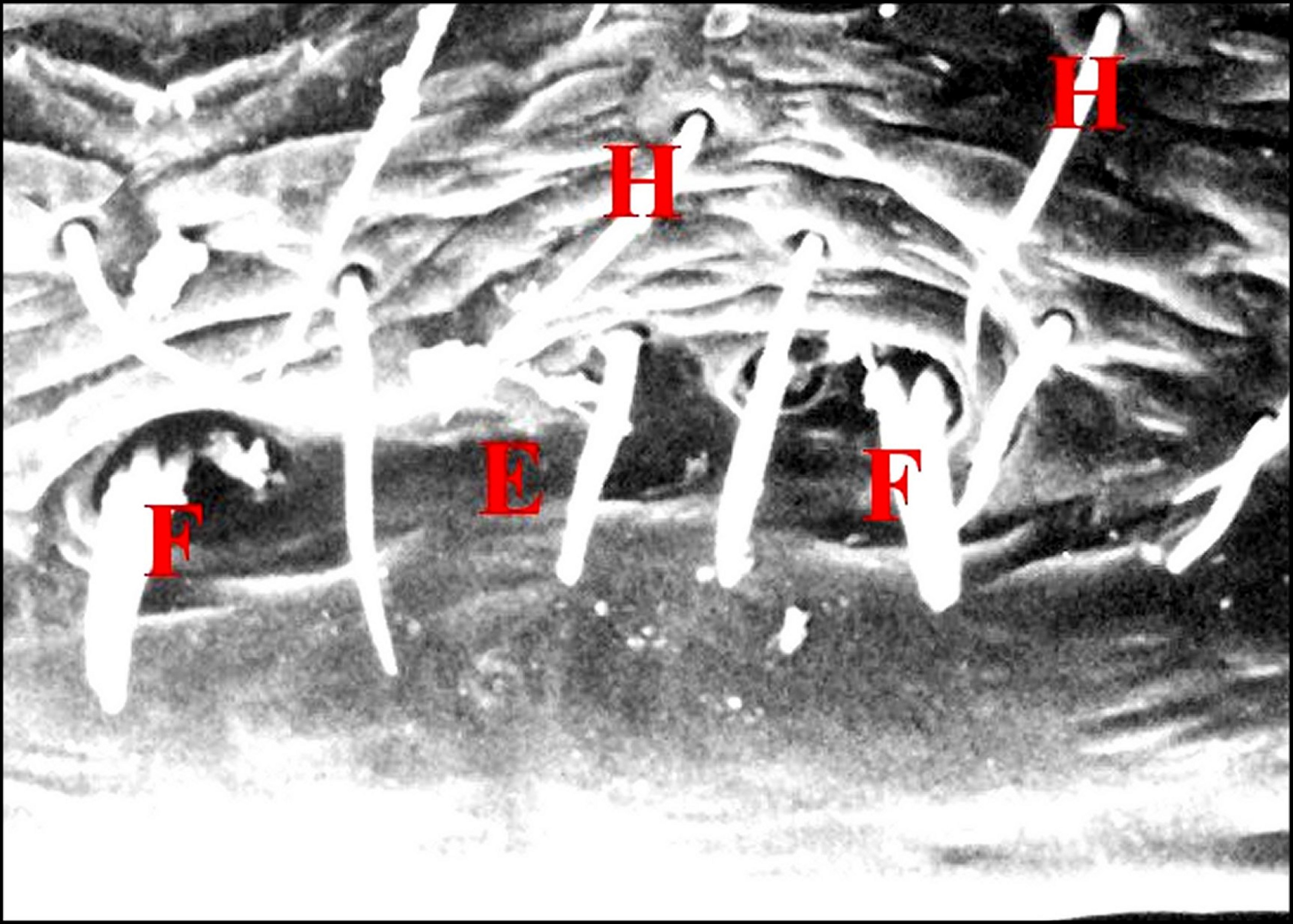 Ensemble des fusules épigastriques prégonoporales de Micrathena schreibersi mâle. Microscope électronique à balayage.